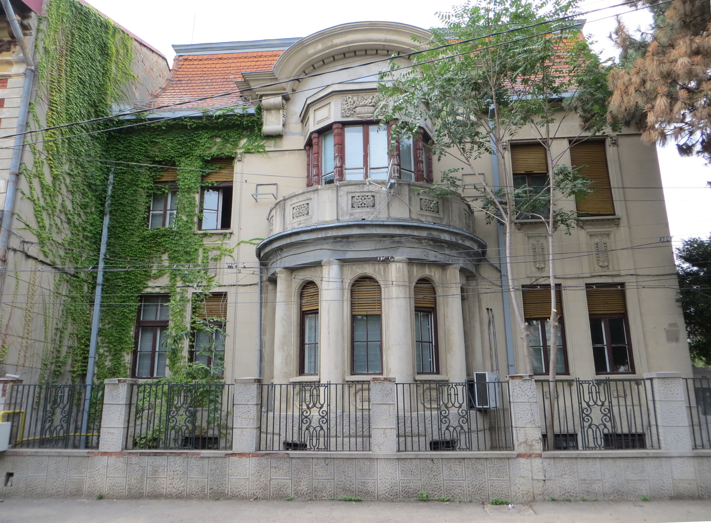 Casă din Str. Armenească 35, București